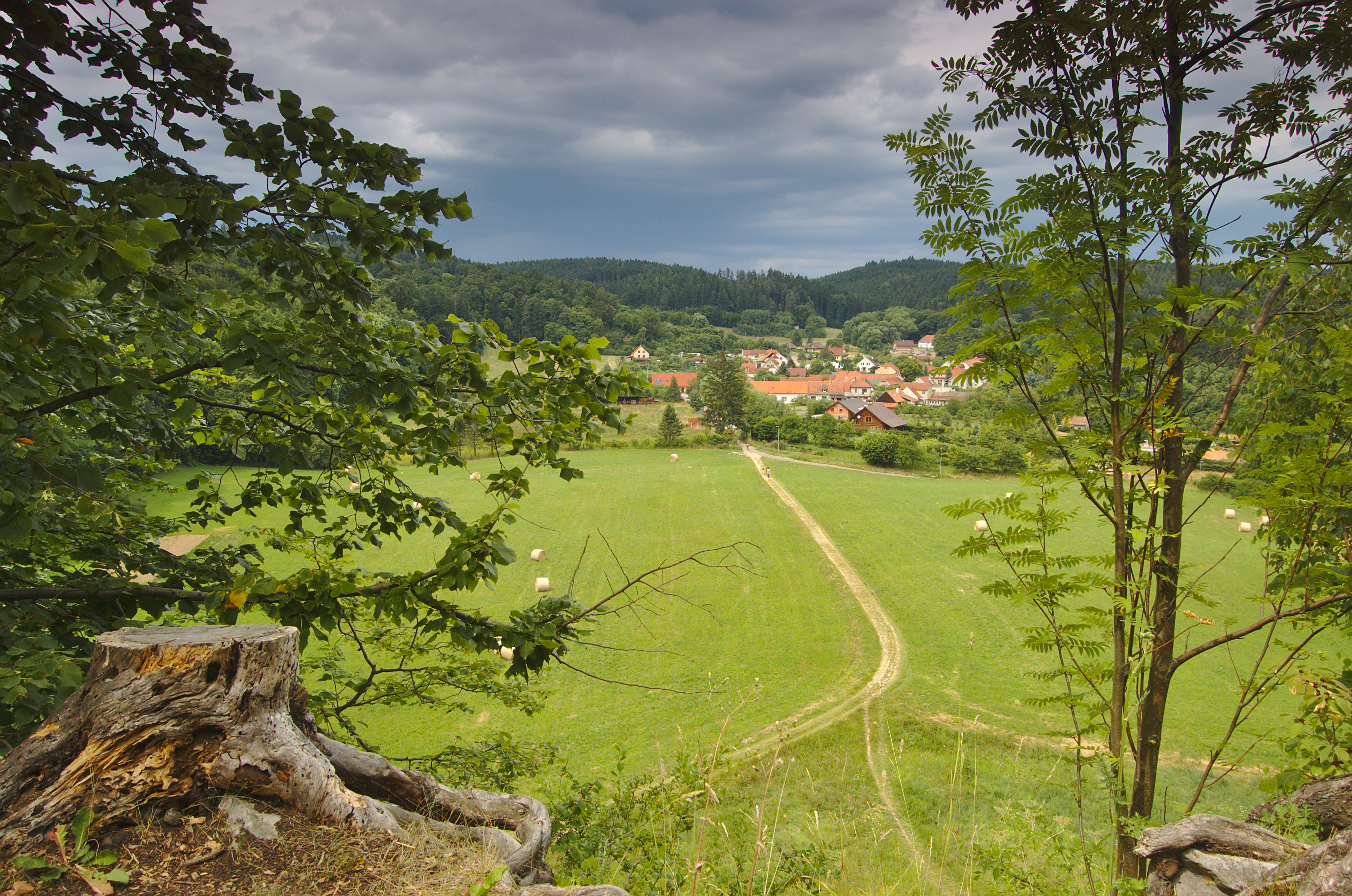 Holštejn - výhled na vesnici ze zříceniny, okres Blansko